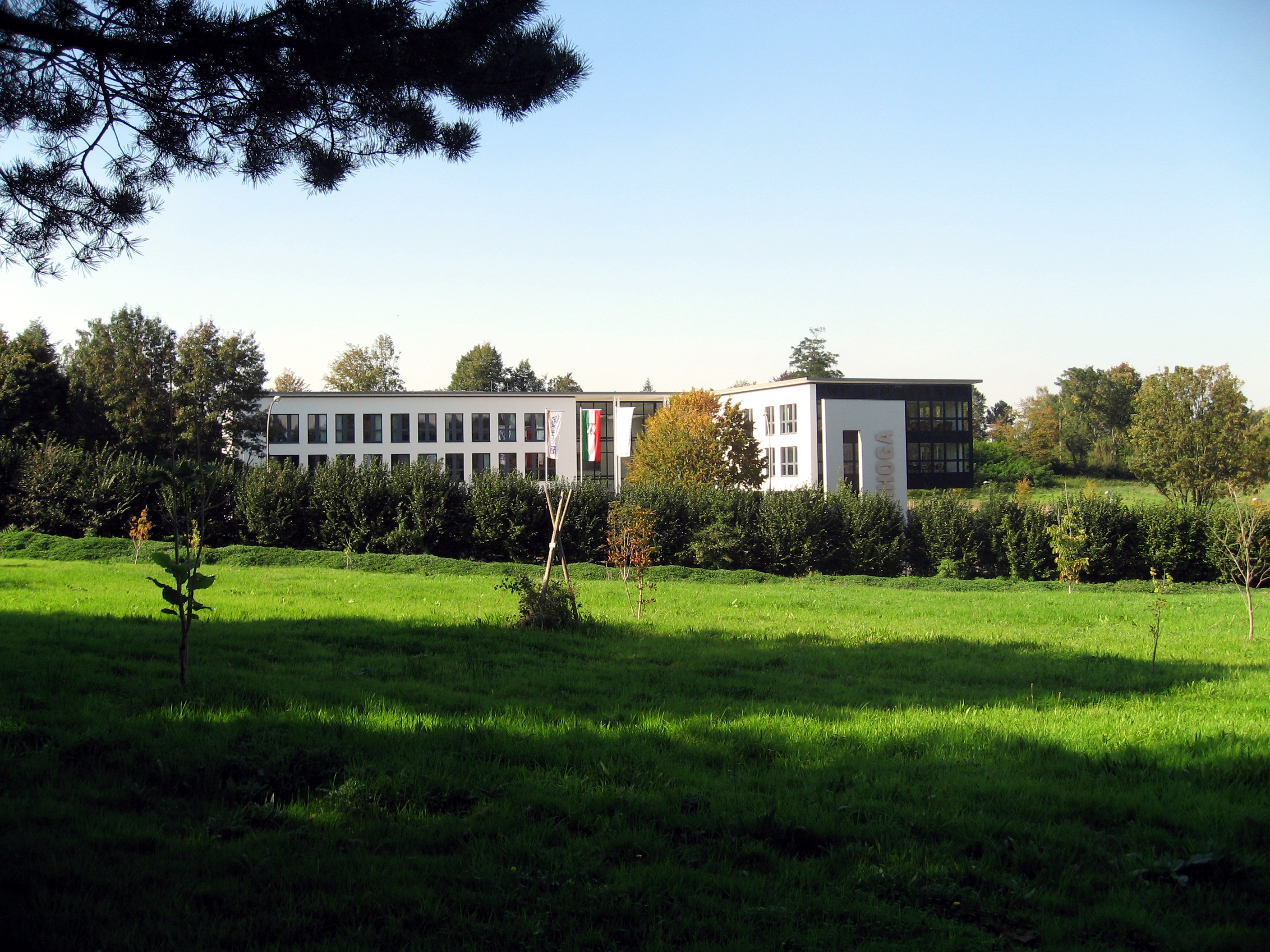 Dortmund, Brünninghausen, WIHOGA, Wirtschaftsfachschule für Hotellerie und Gastronomie Dortmund